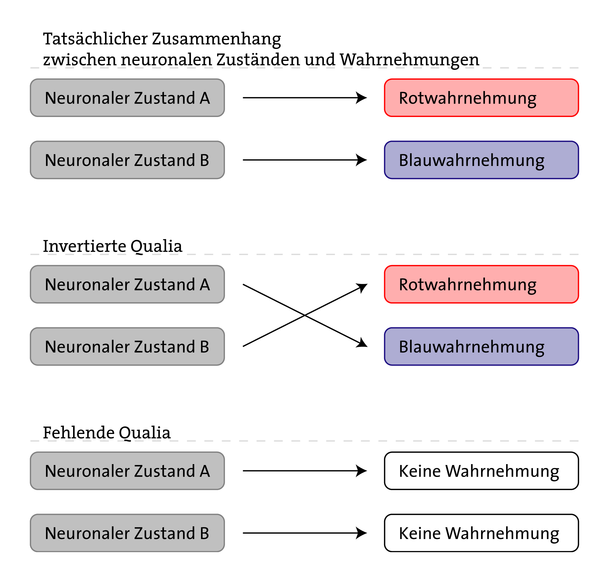 Zu Version 14:53, 7. Apr 2006: Selbst erstellt von User:Madden. Stellt zwei, in der Qualiadebatte wichtige, Gedankenexperimente vor: 1) Fehlende Qualia und 2) Invertierte Qualia.